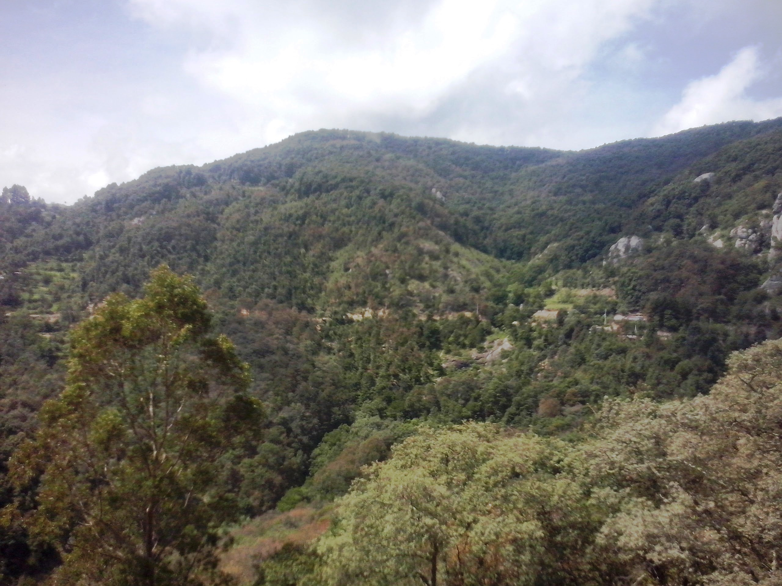 San Andrés Tianguistengo, Actopan, Hidalgo, México